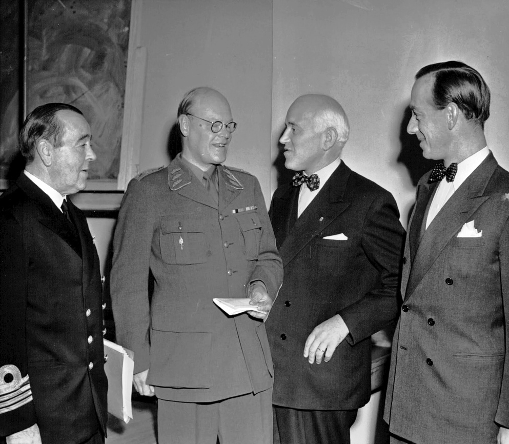 Kommendör David Landquist, general Richard Åkerman, byrådirektör Sellén och förste kontrollant Harry Werner."Försvarshögskolan" eller "kursen för högre försvarsstudier" som den än så länge mera officiellt kallas, tog sin början på Försvarsstaben på måndagen, då de 35 kursdeltagarna samlades till sin första föreläsning och fick tillfälle att närmare bekanta sig med varandra. Tidigare har de under många månader i kompendier fått studera de problem, som de nu mera påtagligt får stifta bekantskap med i föreläsningar och tillämpningsövningar.